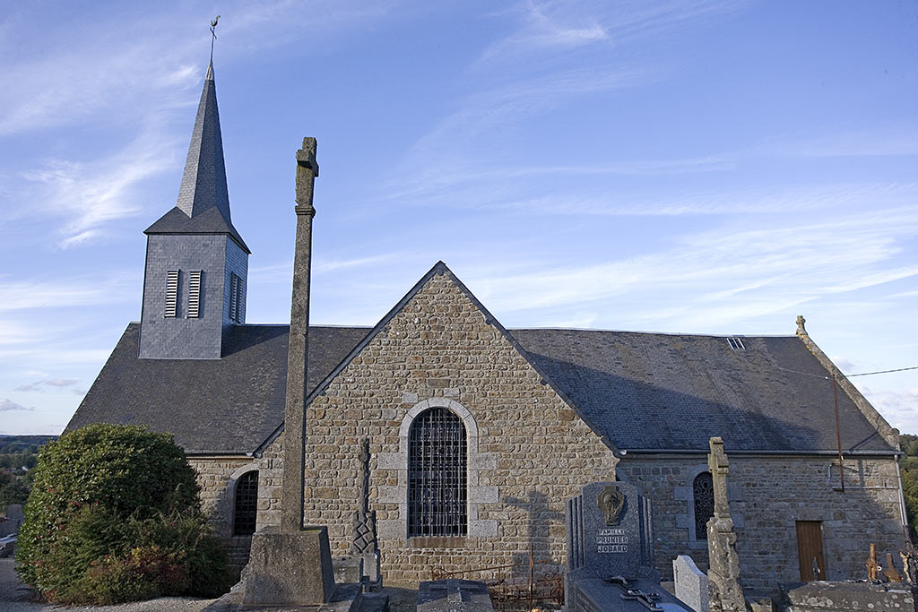 Vue méridionale de l'église Saint-Barthélemy à Saint-Barthélemy (50).